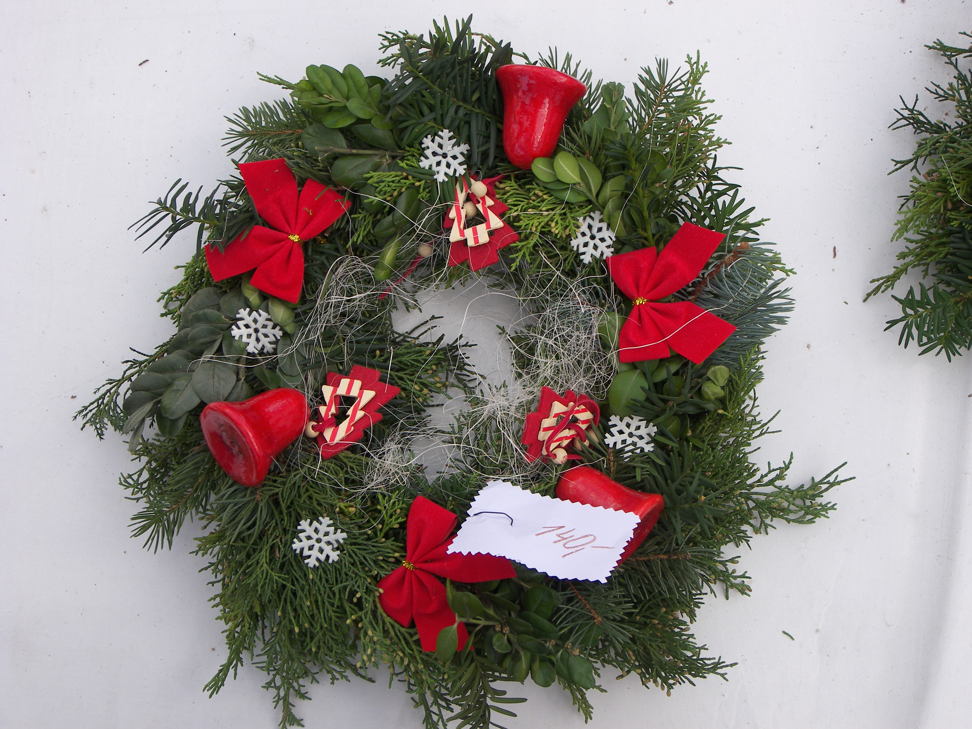 Adventní aranžmá, věneček na dveře, okno, zeď